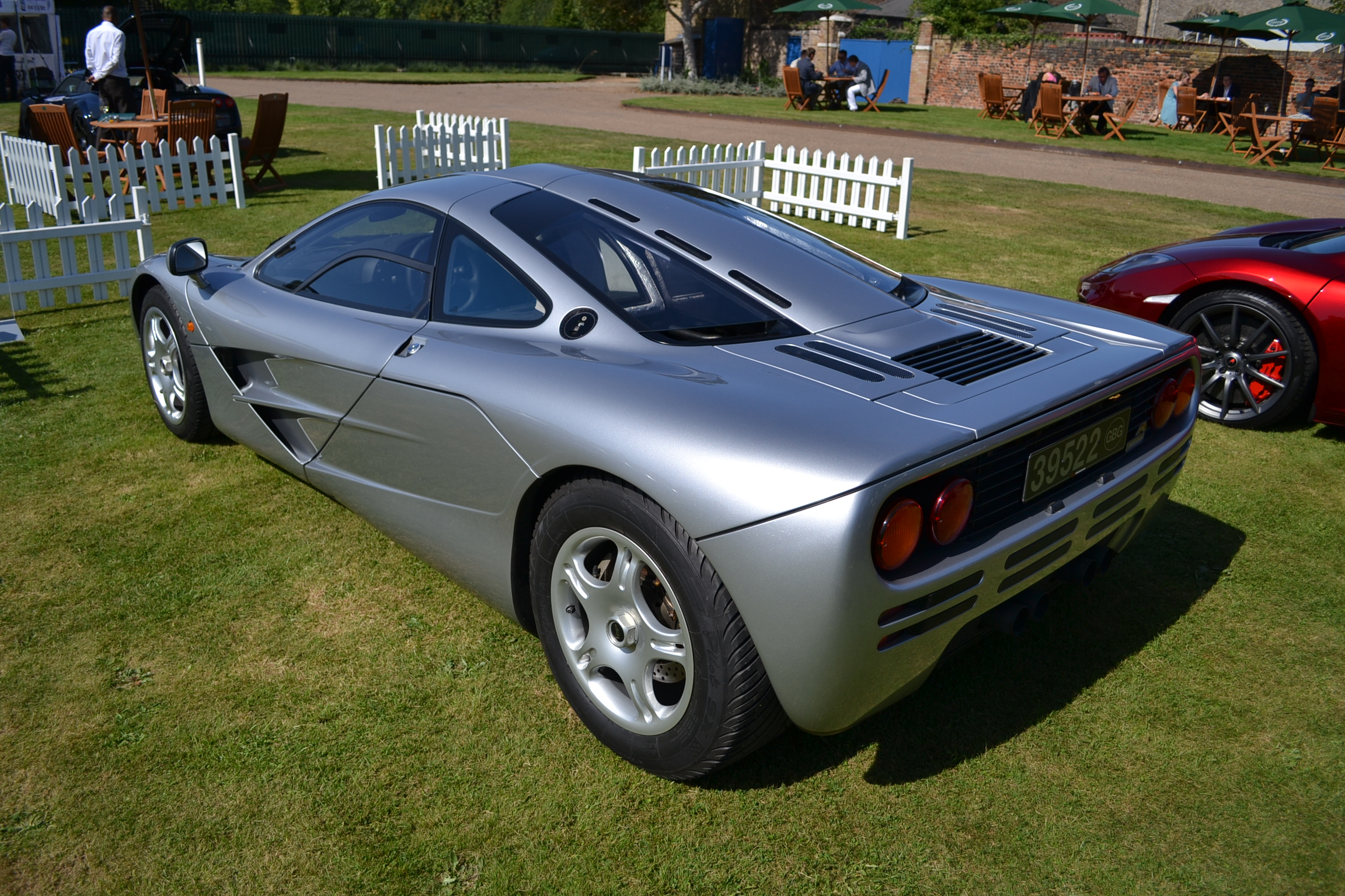 Salon Privé London 2012